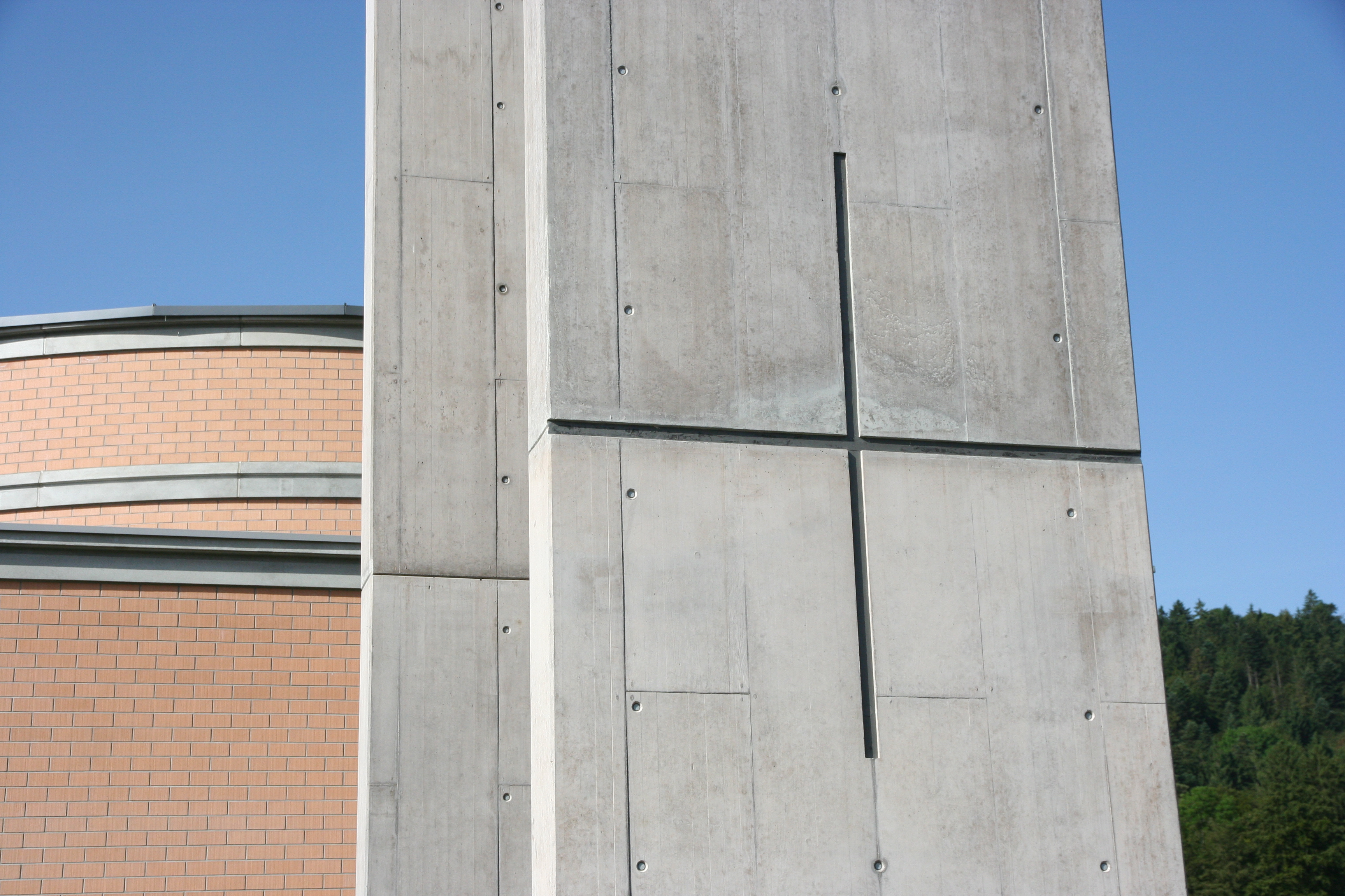 Römisch-katholische Kirche St. Leonhard Feuerthalen, Detail am Kirchturm